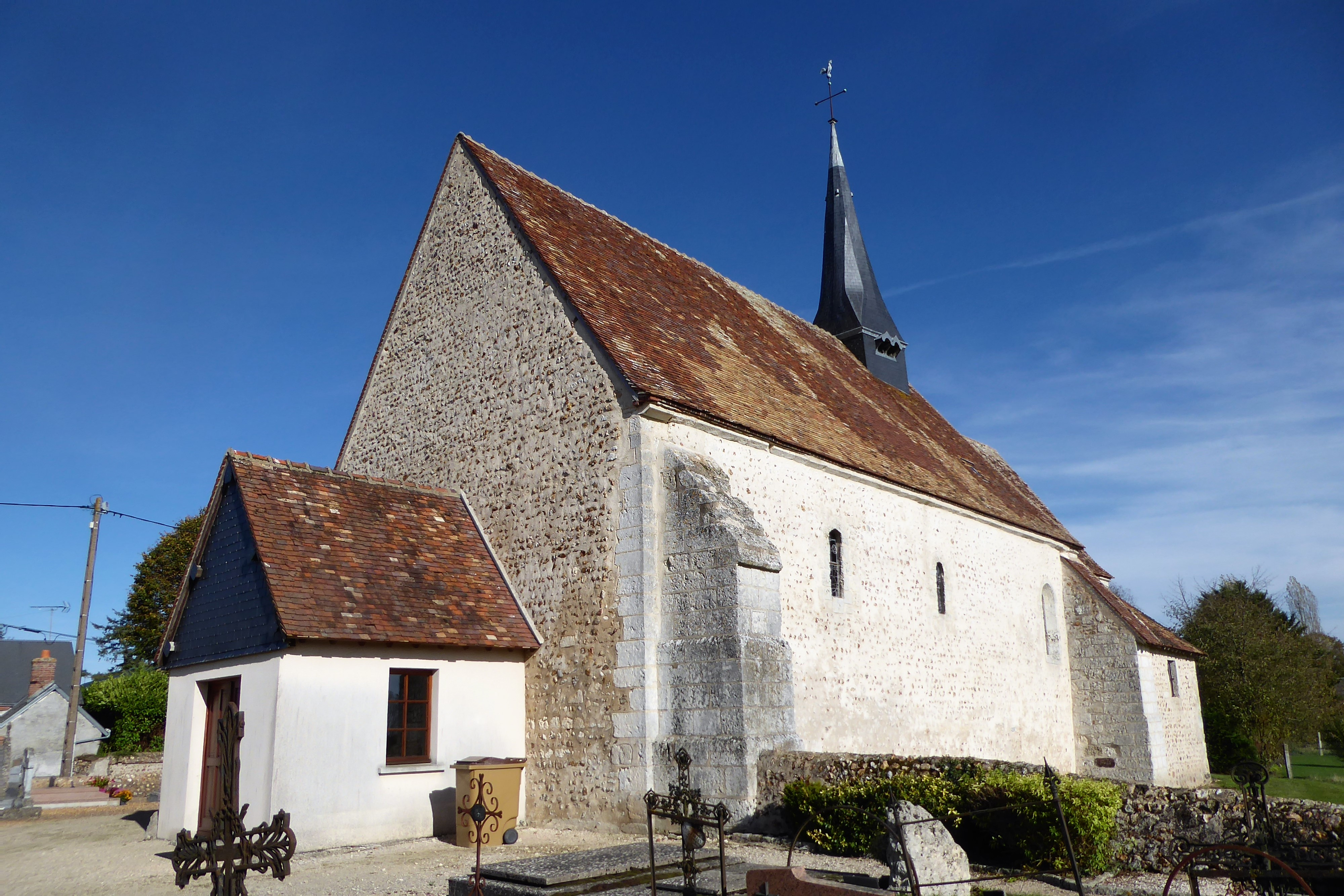 mur sud et caquetoire de l'église Saint-Lubin, entourée de son cimetière, Flacey, Eure-et-Loir, France.